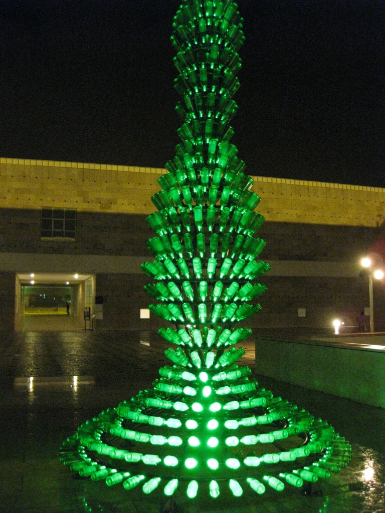 Ամանորյա ժամանակակից շշերով տոնածառ